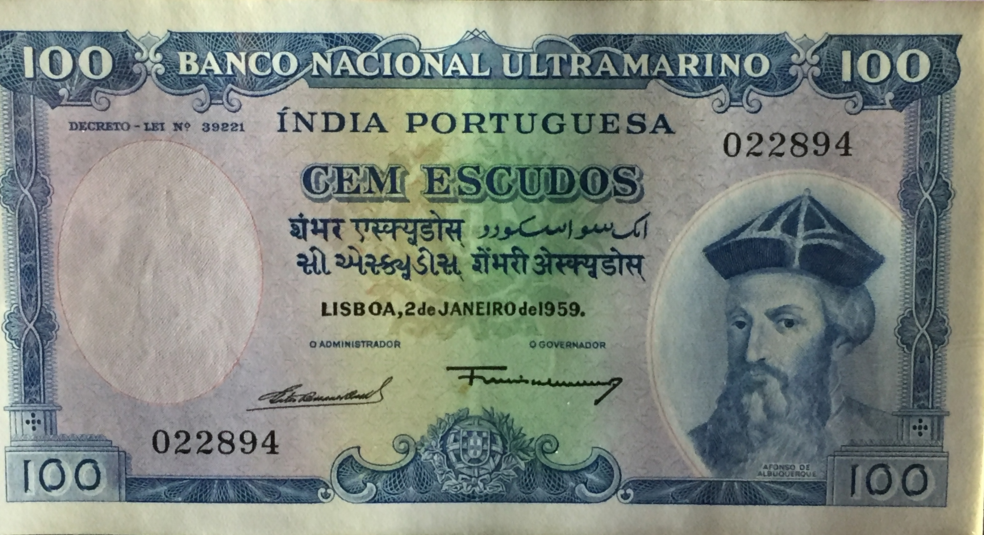 Billete de 100 escudos de la India Portuguesa, emitido por el Banco Nacional Ultramarino en 1959. Colección del Museo do Dinheiro de Lisboa.